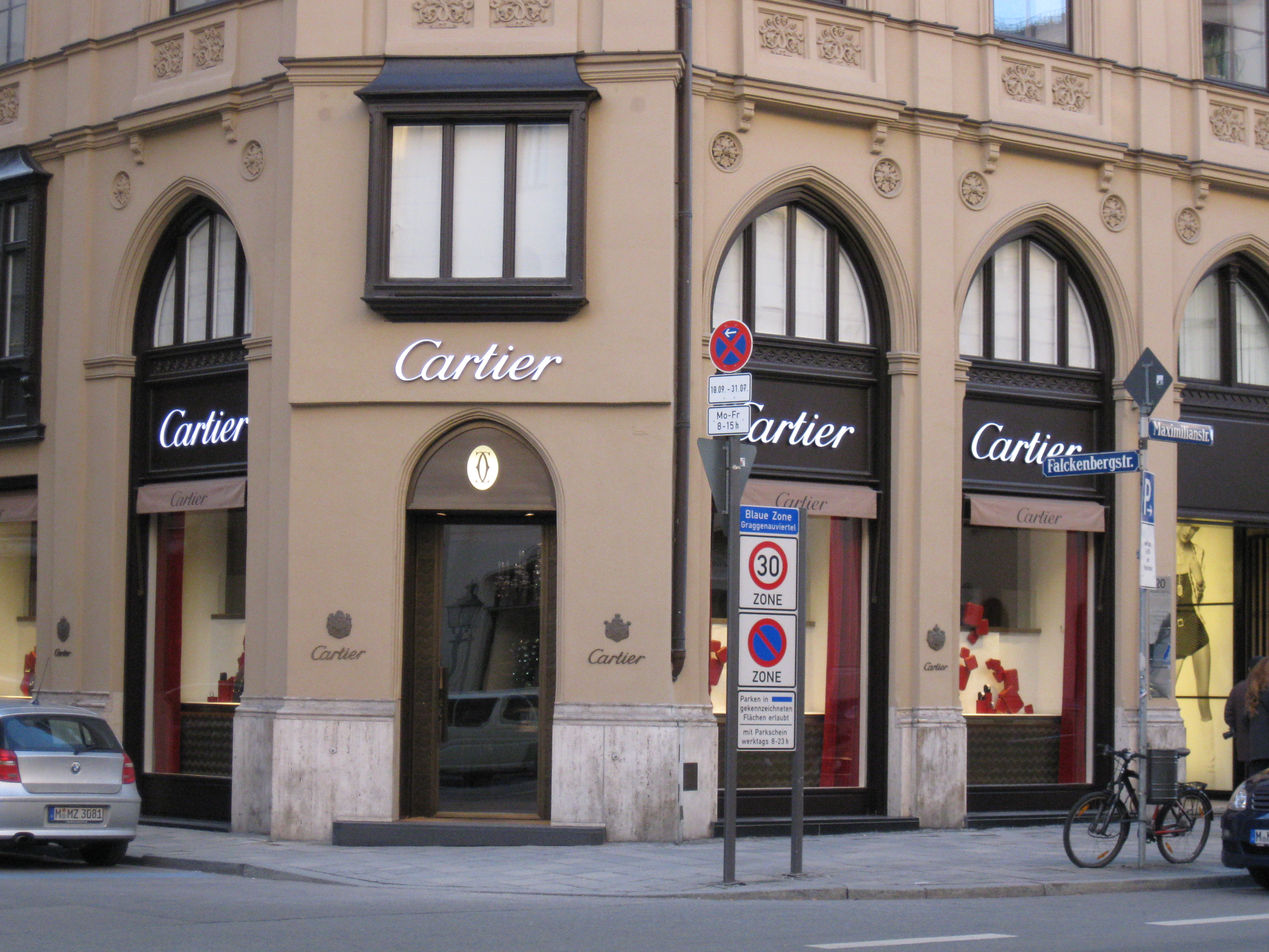 Geschäft in München, Maximilianstrasse